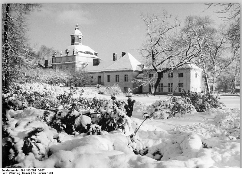 Berlin, Köpenicker Schloss, Winter ADN-ZB Weisflog 15.1.81 Schöne DDR-Berlin: Das Köpenicker Schloß im Winterkleid.